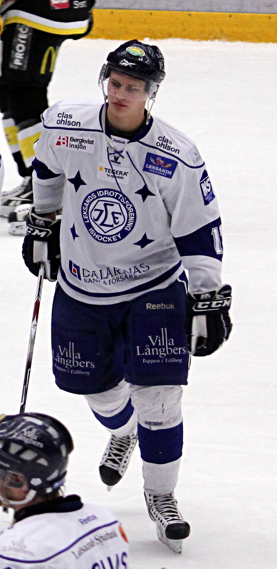 Martin Janolhs för Leksands IF mot VIK Västerås HK 29 januari 2011.